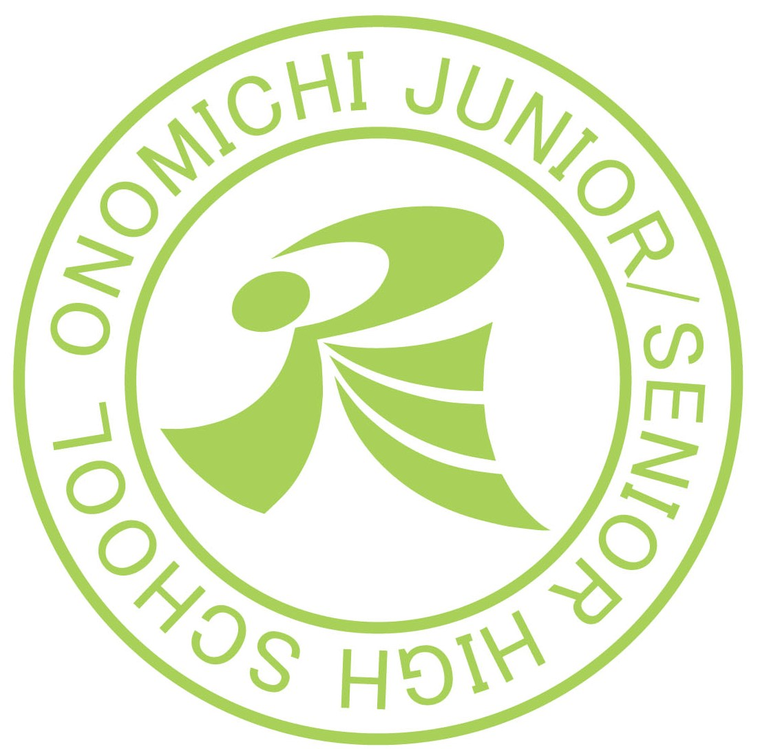 尾道中学校・高等学校 校章